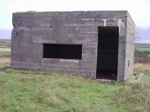 Building at HMS Vulture II (Treligga Aerodrome)